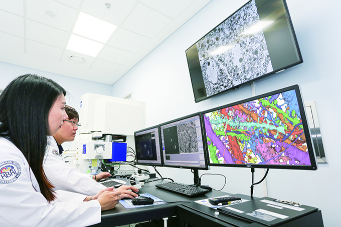 한국뇌연구원-첨단장비센터